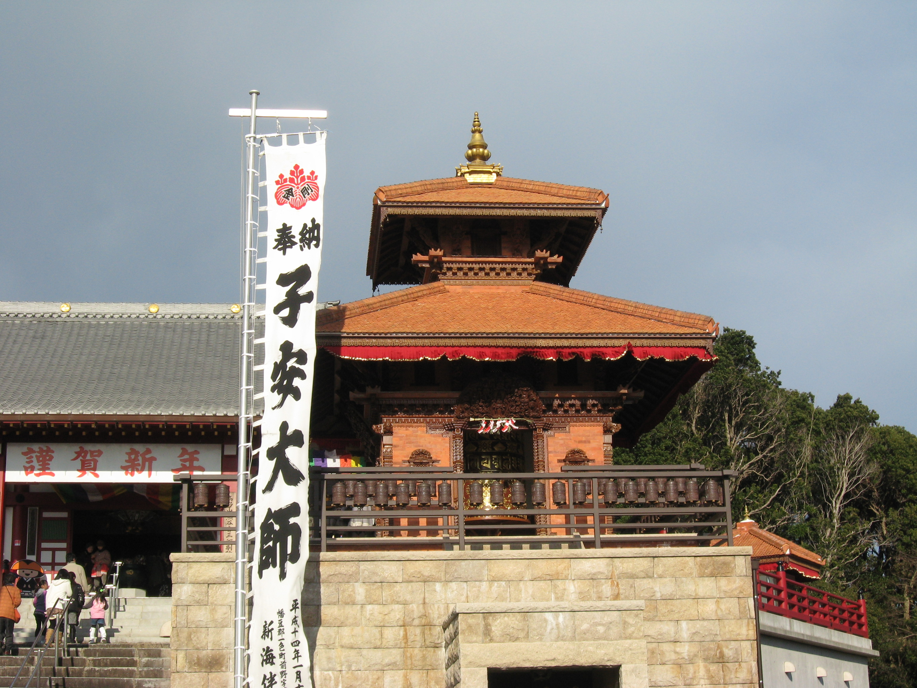 愛知県蒲郡市の金剛寺にある仏塔。